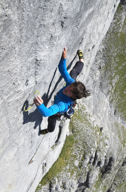 Matteo Della Bordella su Infinite Jest, Wendenstocke